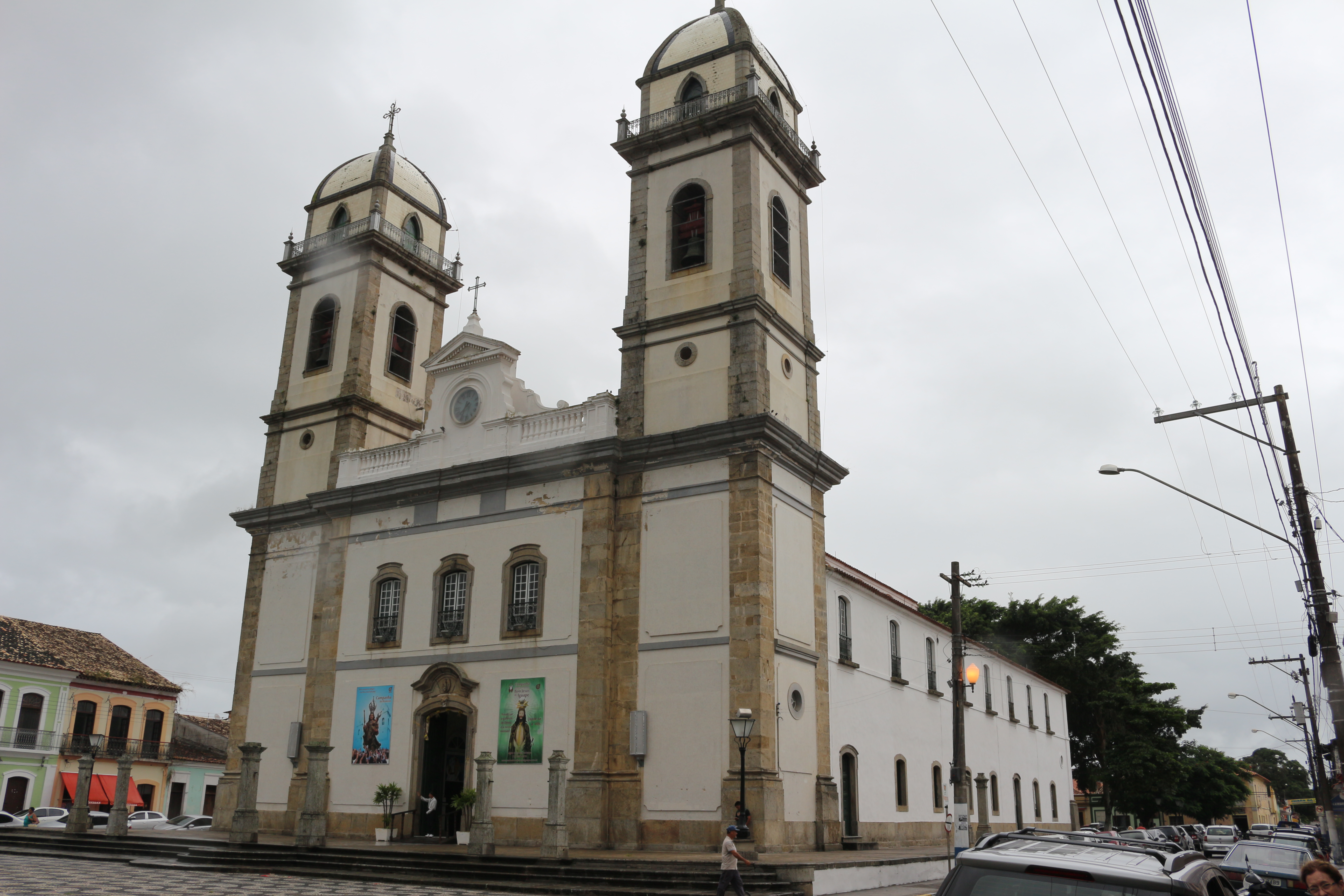 Praça da Basílica, 114 – Centro, Iguape - SP. Fachada